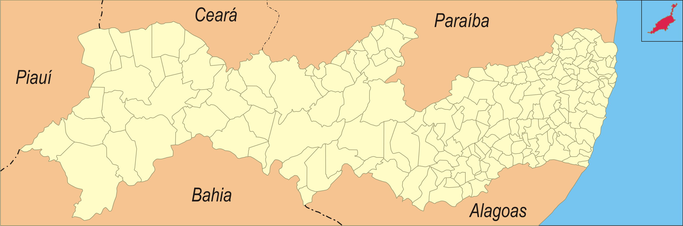 Localização da cidade em Pernambuco